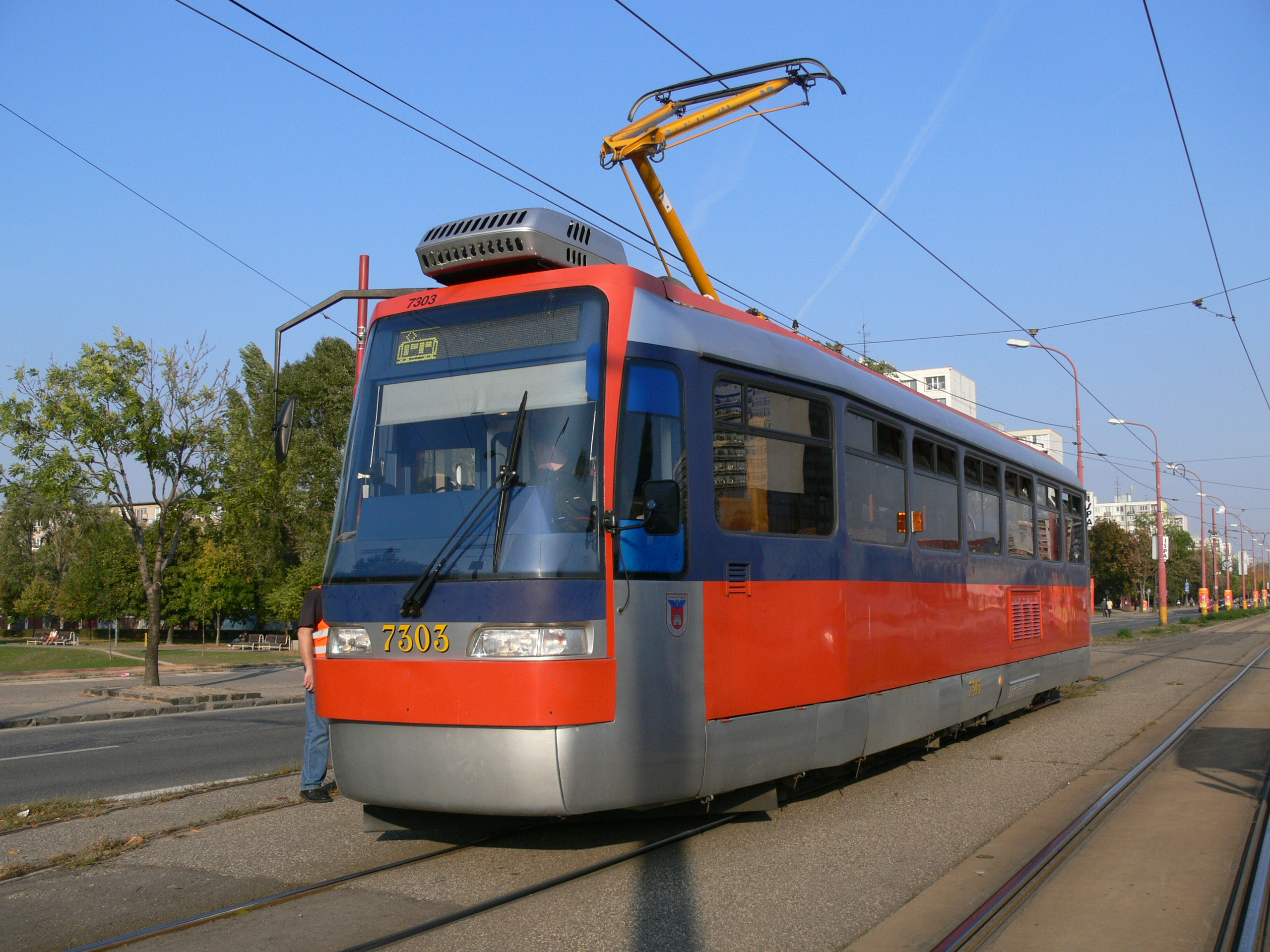 T3AS #7303 on Ruzinovska street